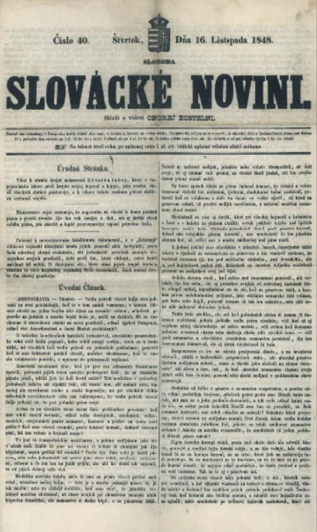 Titulný list periodika Slovácke novini z r. 1848.